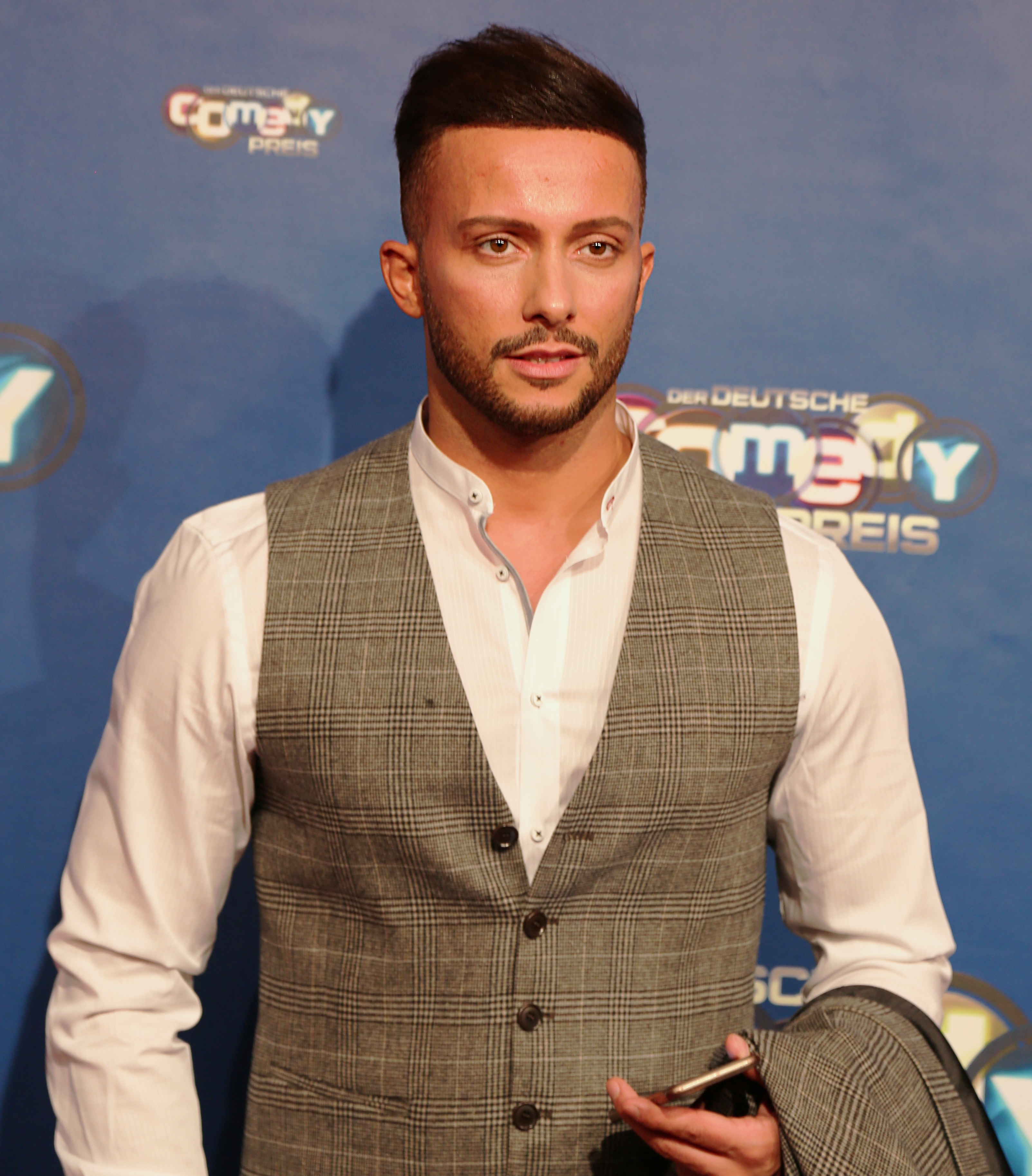 Domenico De Cicco beim Deutschen Comedypreis 2017.